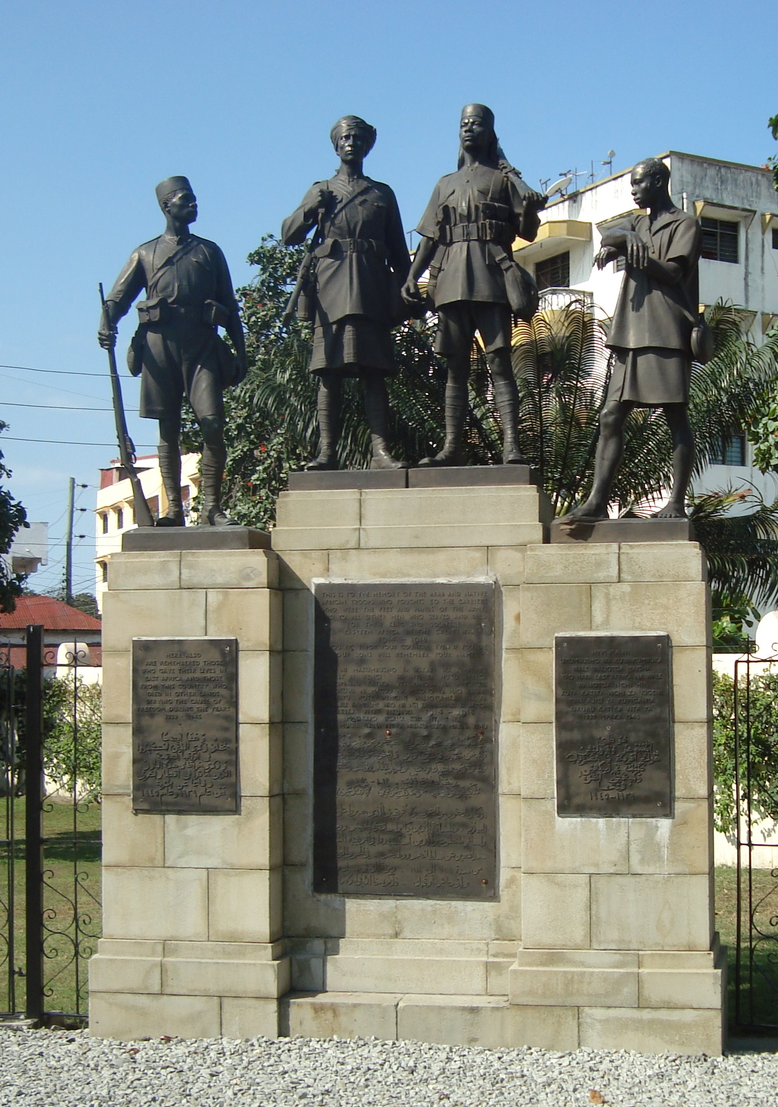 Kiswahili: Kumbukumbu ya askari Waafrika waliopigania vita kuu I kwa Uingereza: Sanamu ya Mombasa inaonyesha mpelelezi (scout), askari Mwarabu, askari wa KAR na mpagazi